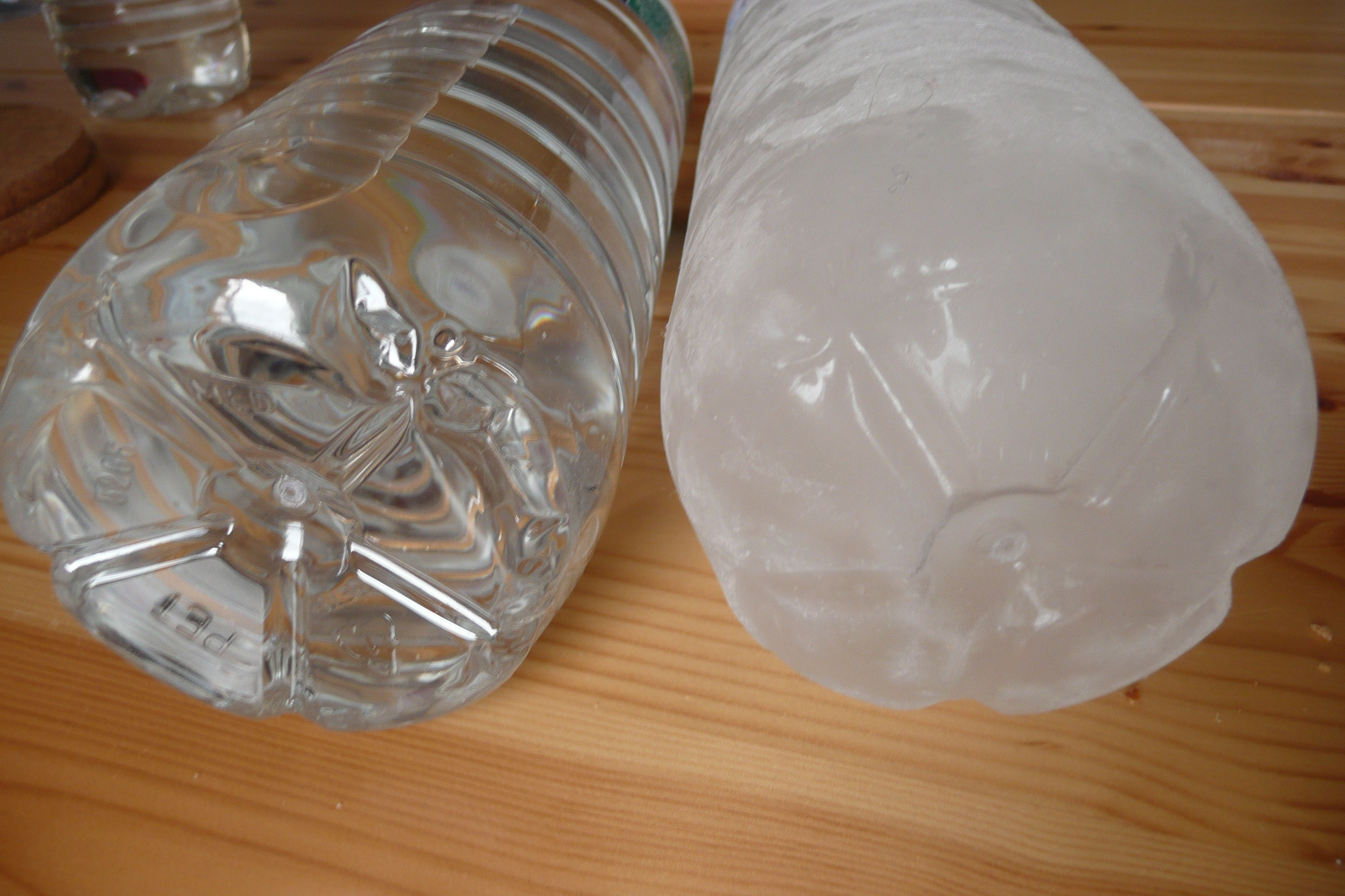 A droite bouteille d'eau liquide et à gauche complètement congelé.